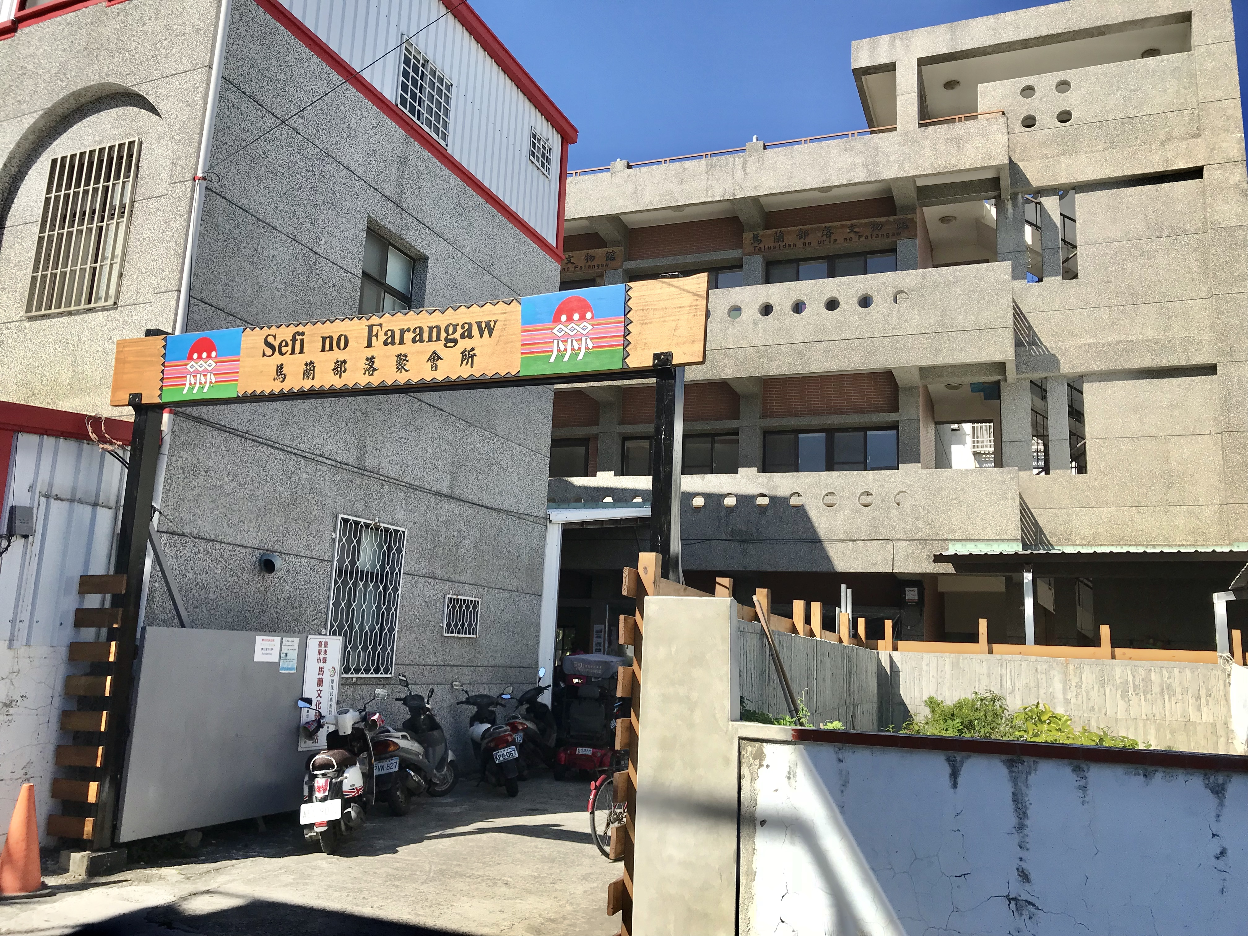 臺灣臺東縣馬蘭部落聚會所